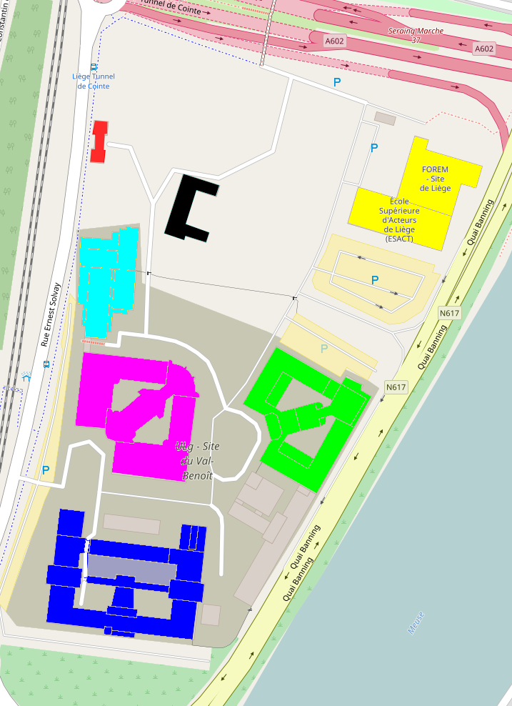 carte du Val-Benoît